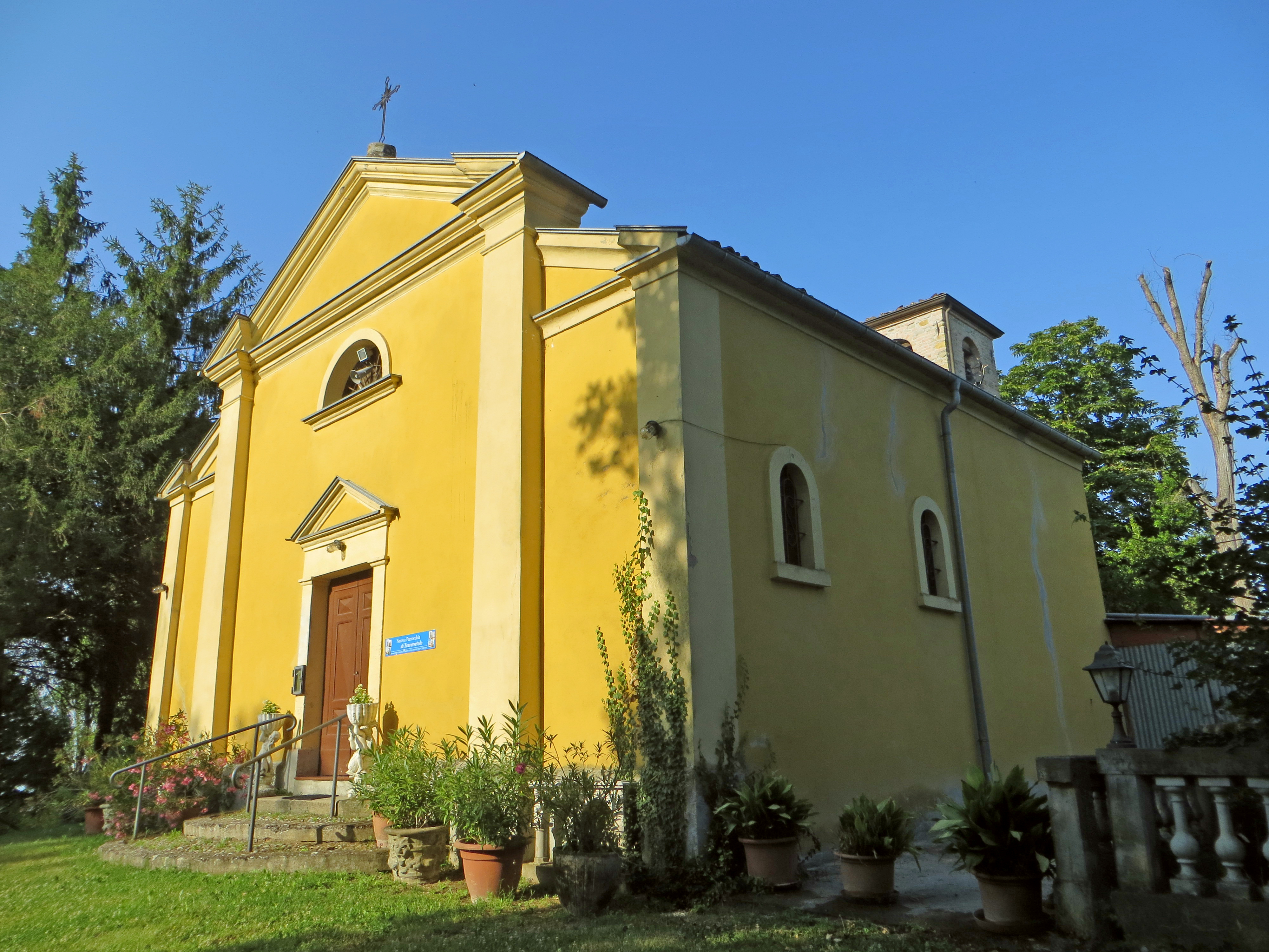 Chiesa di San Nicolò (Cazzola, Traversetolo) - facciata e lato sud